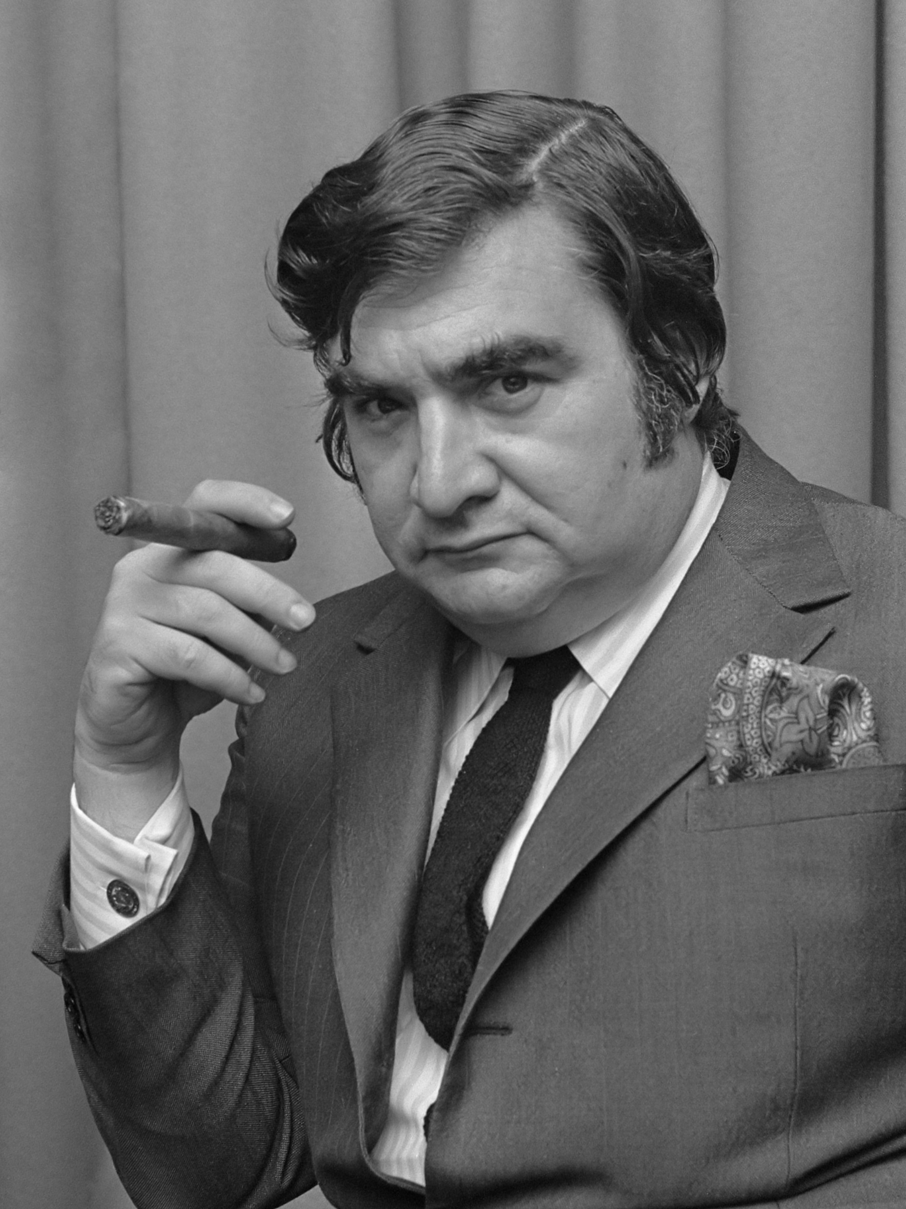 De Amerikaan Pierre Salinger , vroegere perschef in het Witte Huis van President John F. Kennedy , thans directeur van Gramco International geeft een persconferentie 3 juli 1970